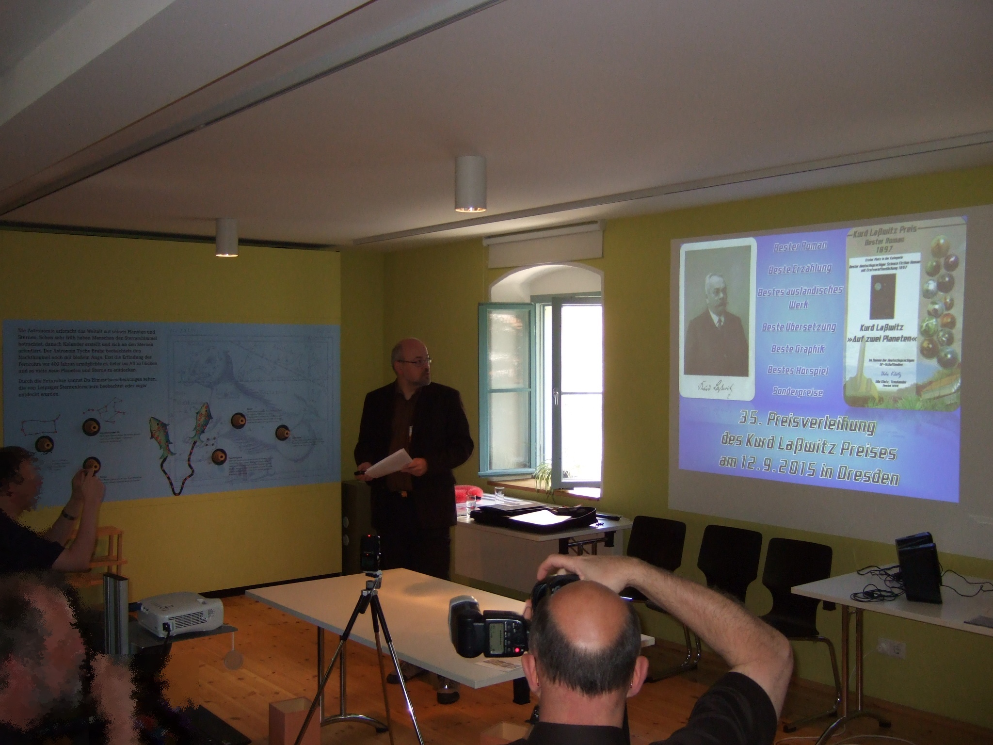 Udo Klotz Treuhänder des Kurd-Laßwitz-Preises bei der Verleihung 2015